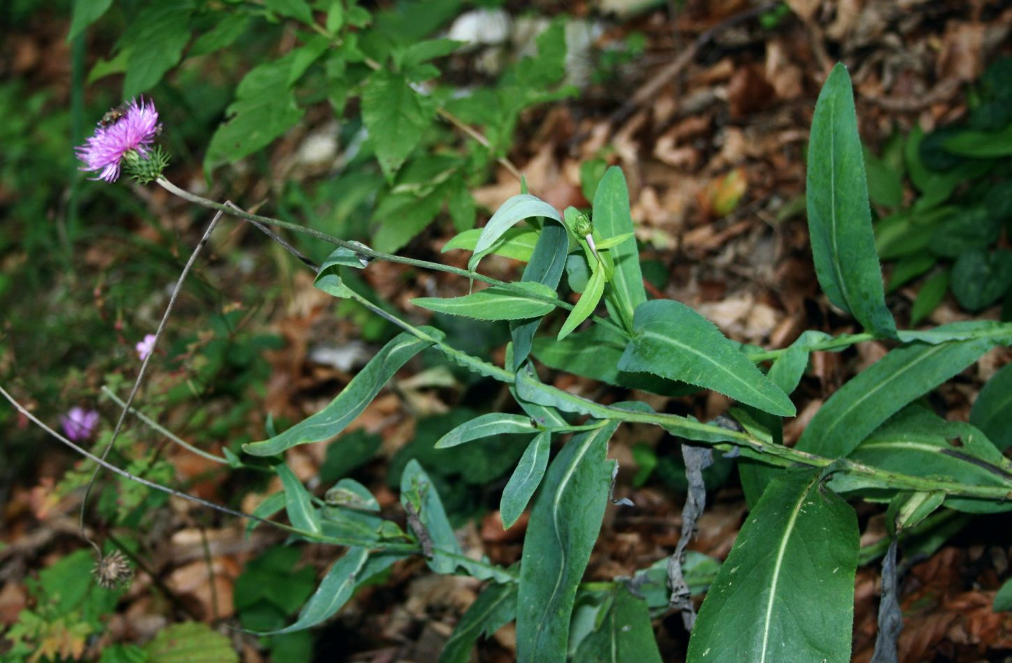 Blaugrüne Dickblatt-Ringdistel (Carduus crassifolius subsp. glaucus), Korbblütler (Asteraceae) – Österreich/Austria/Autriche: Steiermark, Grazer Bergland, Weizklamm 6–7 km NNW Weiz